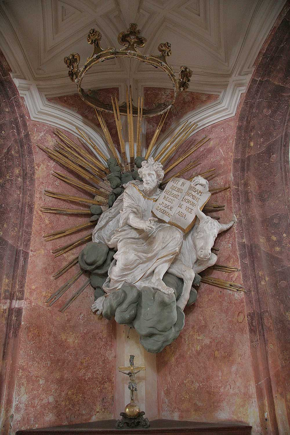 Poutní kostel Sv. Jana Nepomuckého, district Žďár nad Sázavou, Czech Republic